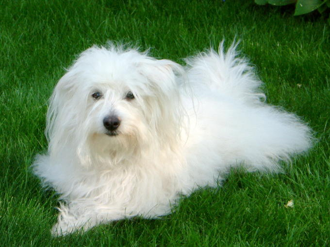 Hündin „Dhana“, Coton de Tular